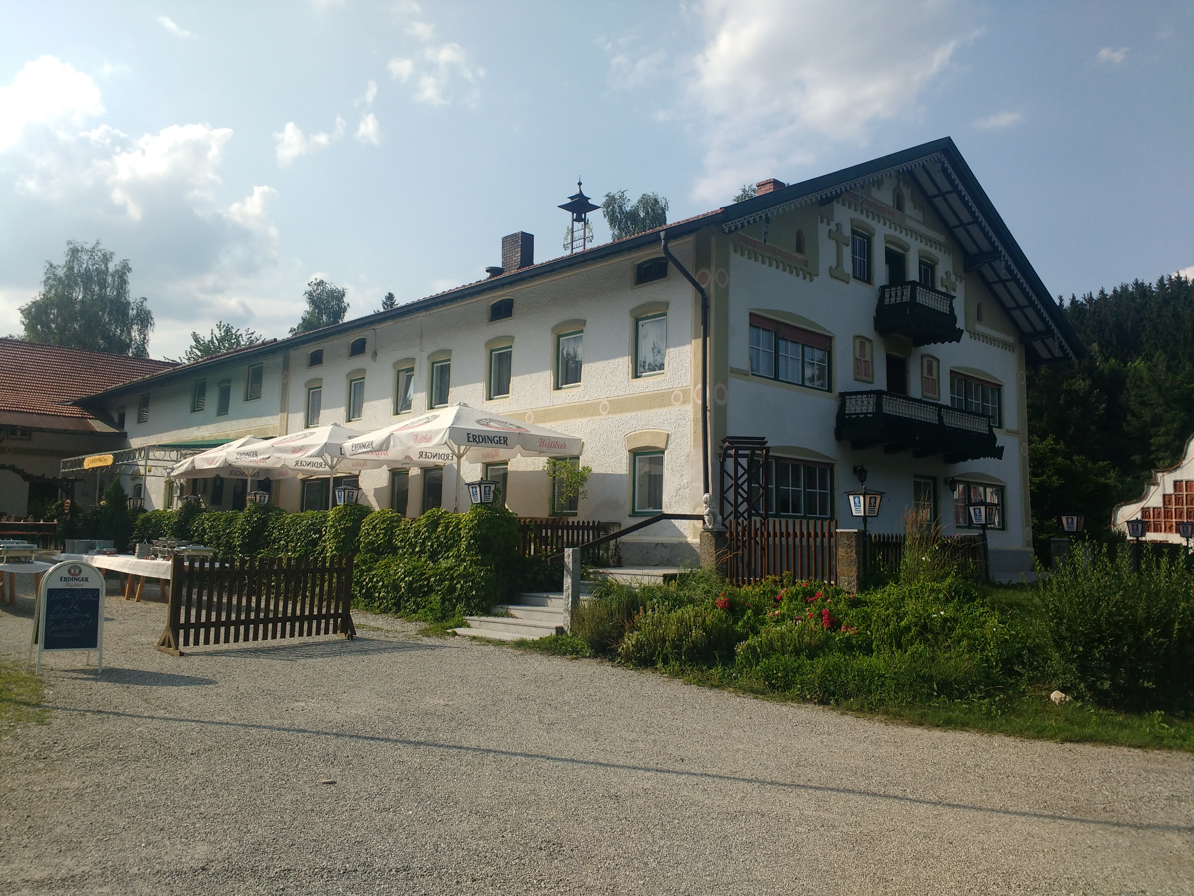 Lain 1 - Taufkirchen (Vils); Denkmalnummer D-1-77-139-31 Ehemaliger Dreiseithof zweigeschossiger Massivbau mit flachem Satteldach und rückwärts mit Schweifgiebeln und Kachelfriesen, bezeichnet mit „1892“